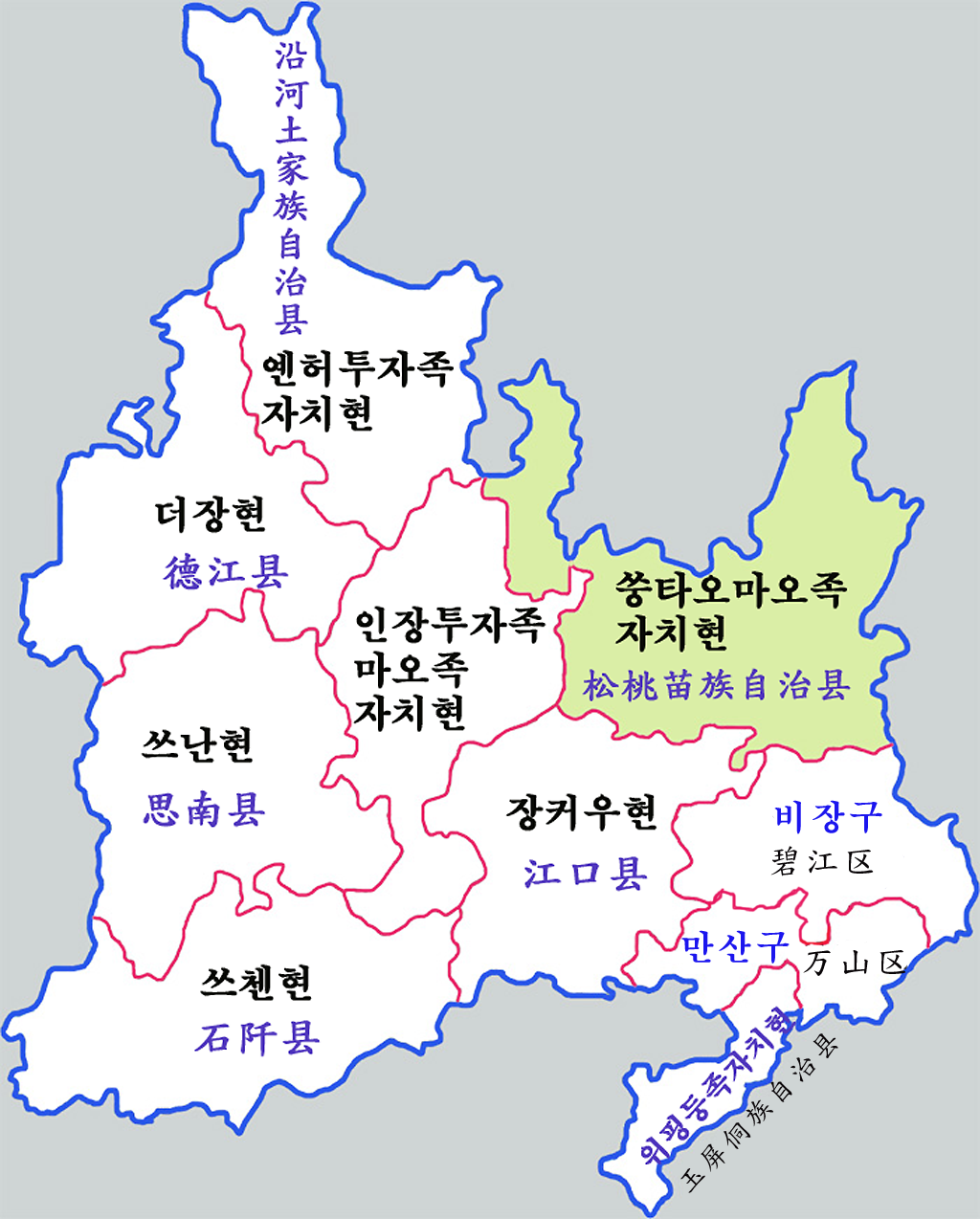 구이저우성 퉁런시 현급구역